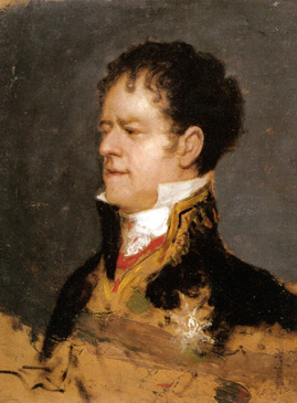 Boceto para el retrato del aristócrata, militar y politico español José Miguel de Carvajal y Manrique (1771-1828), II duque de San Carlos y conde de Castillejo y del Puerto.